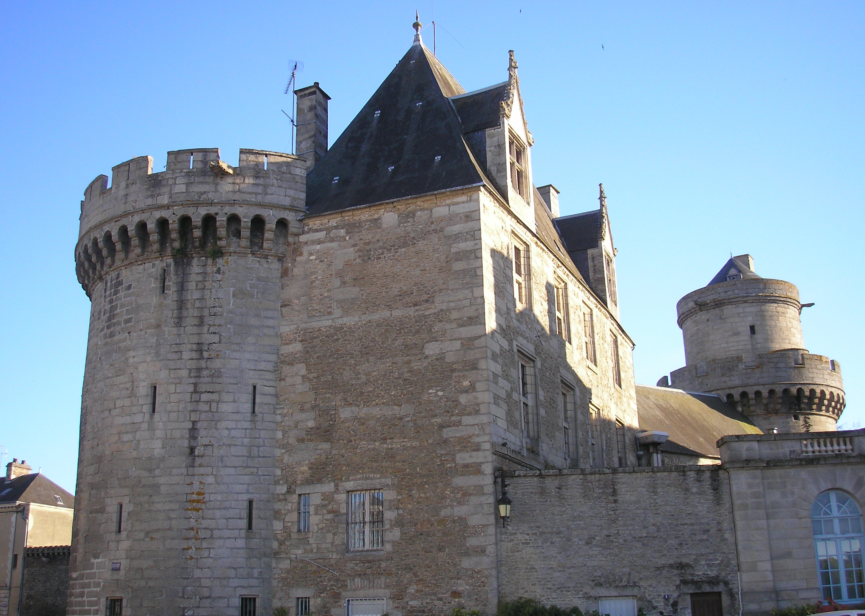 Alençon (Normandie, France). Le château des Ducs.